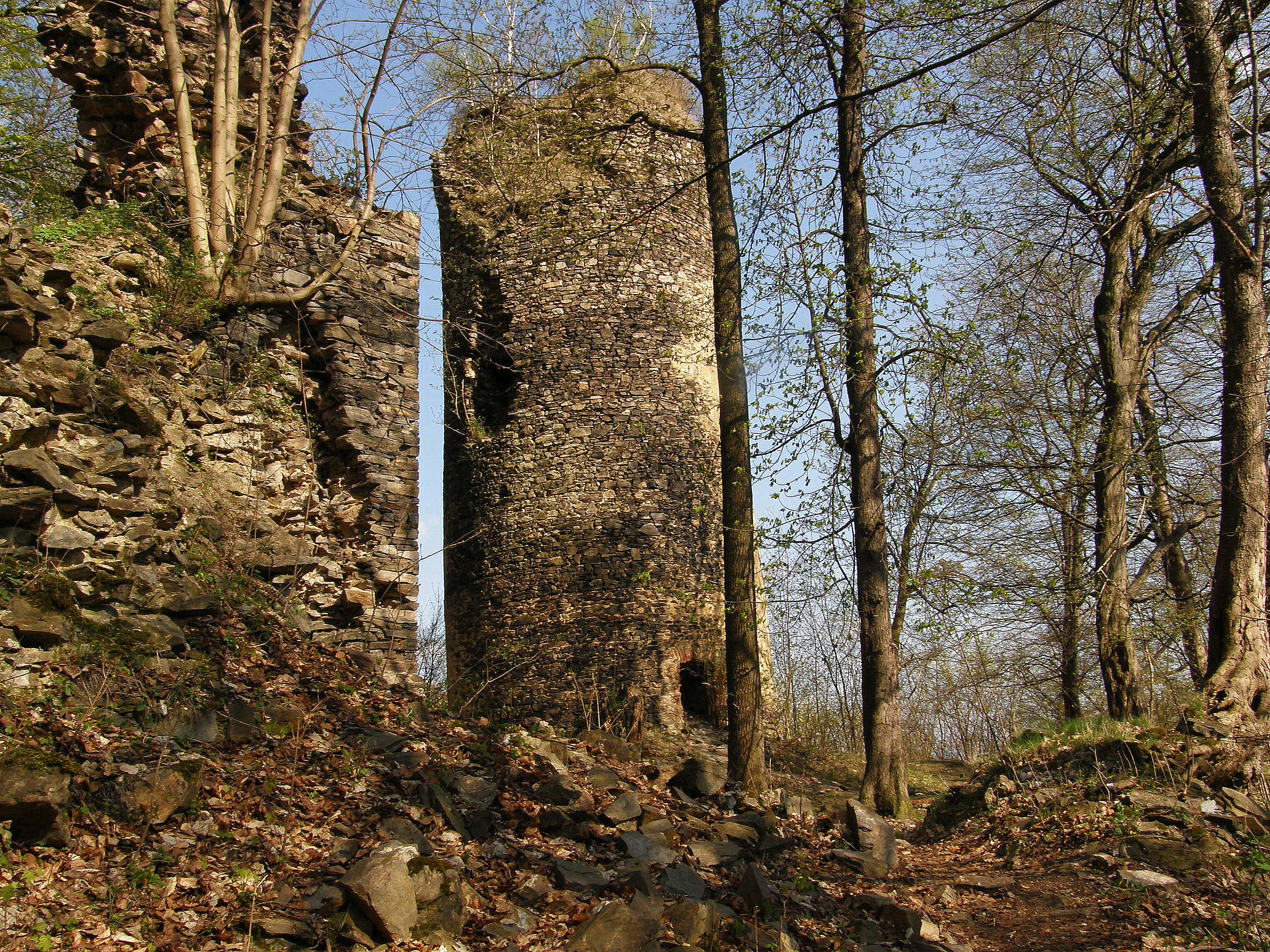 Hrad Osek - Rýzmburk - stavba zahájena na počátku 13. stoletá, dokončena v r. 1250. Jižní věž chránící vstup do hradu.